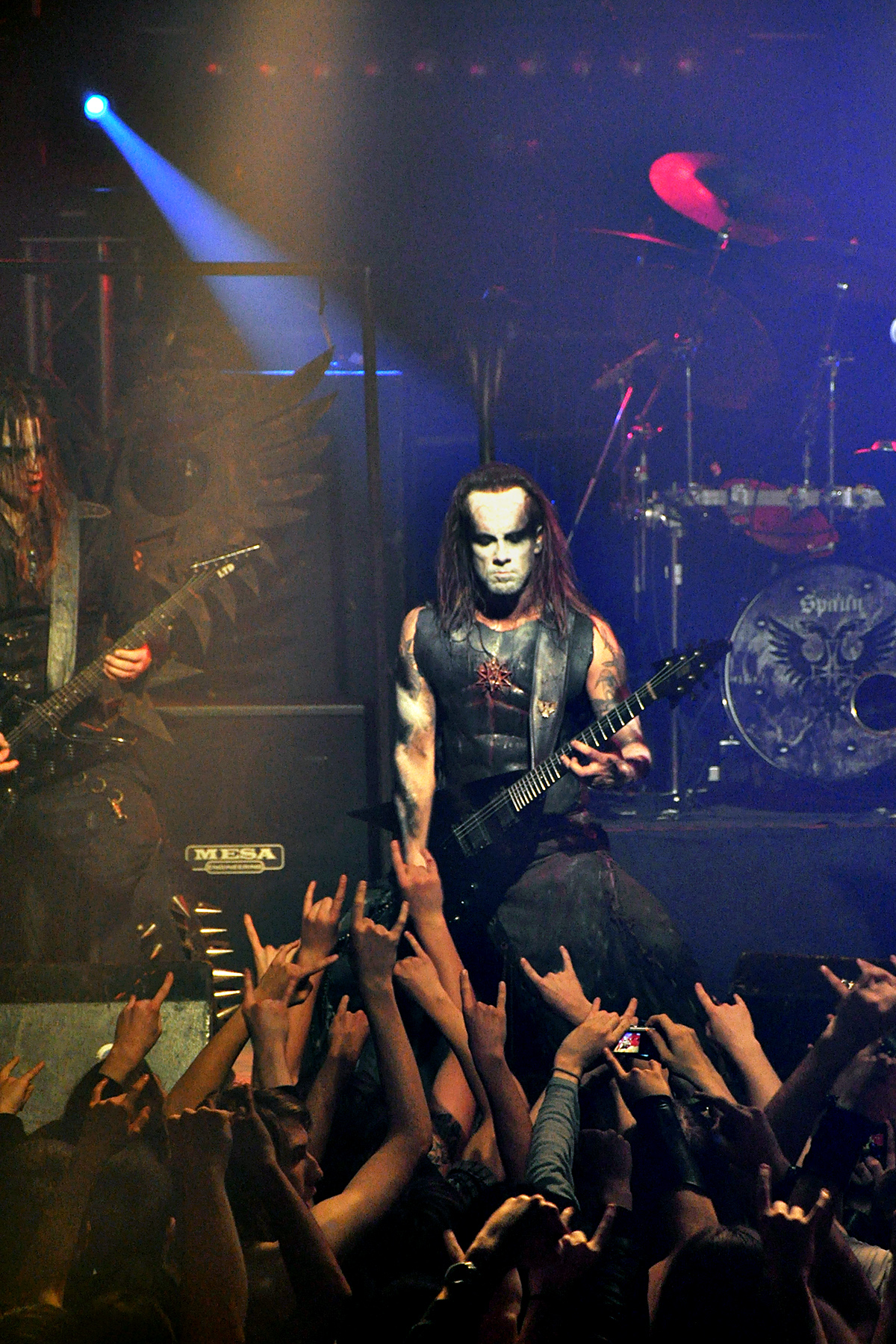 Behemoth en concert à la Locomotive, à Paris, le 27/10/2009: Nergal ( Adam Darski).